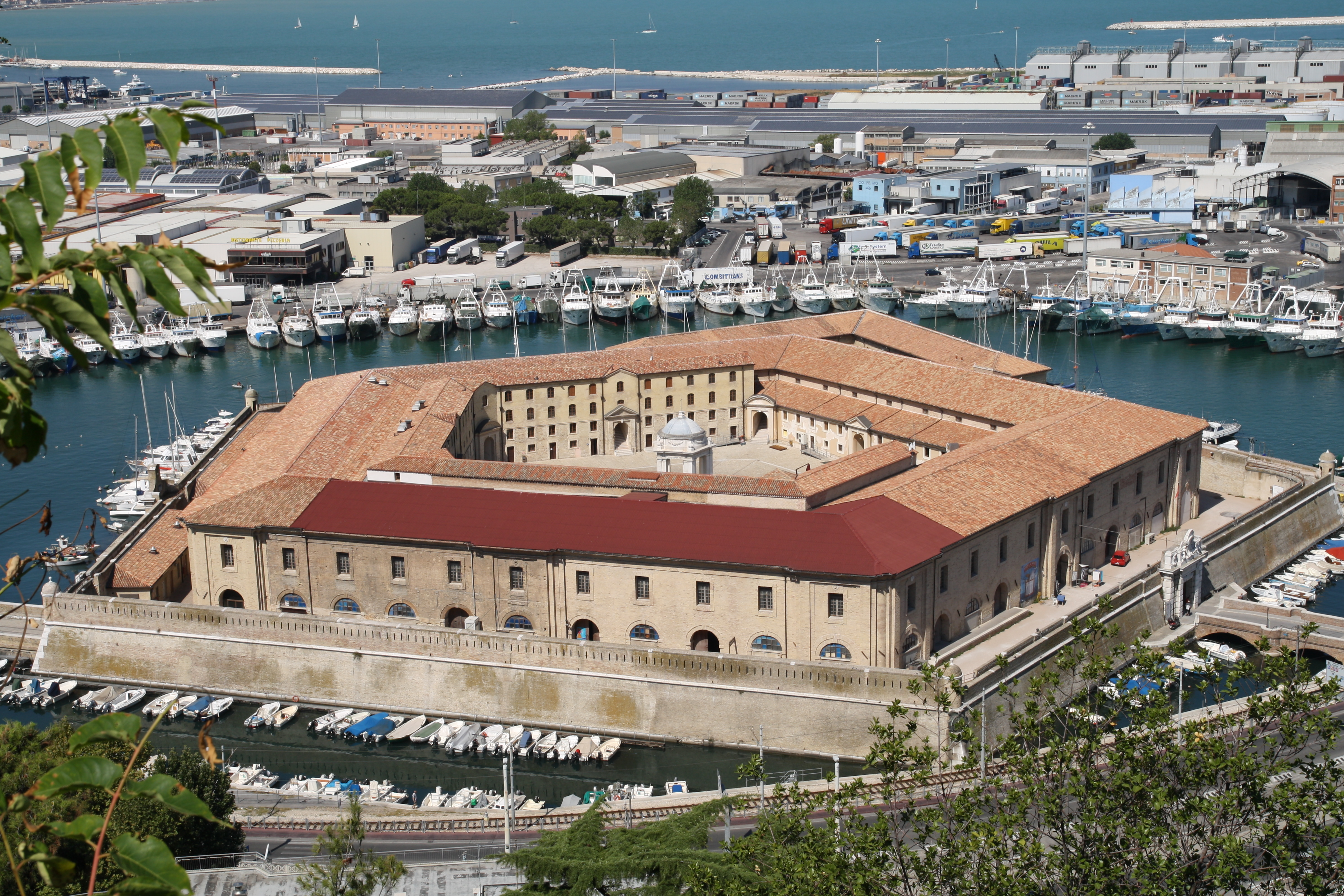 Mole Vanvitelliana This is a photo of a monument which is part of cultural heritage of Italy.